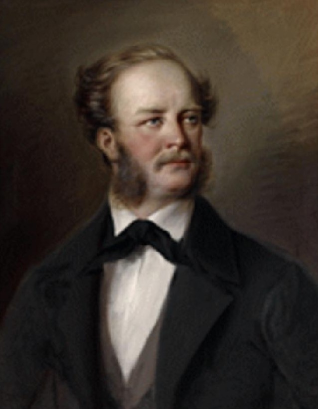 Jiří Jan Jindřich Buquoy (1814-1882), rakouský šlechtic z rodu Buquoyů a politik